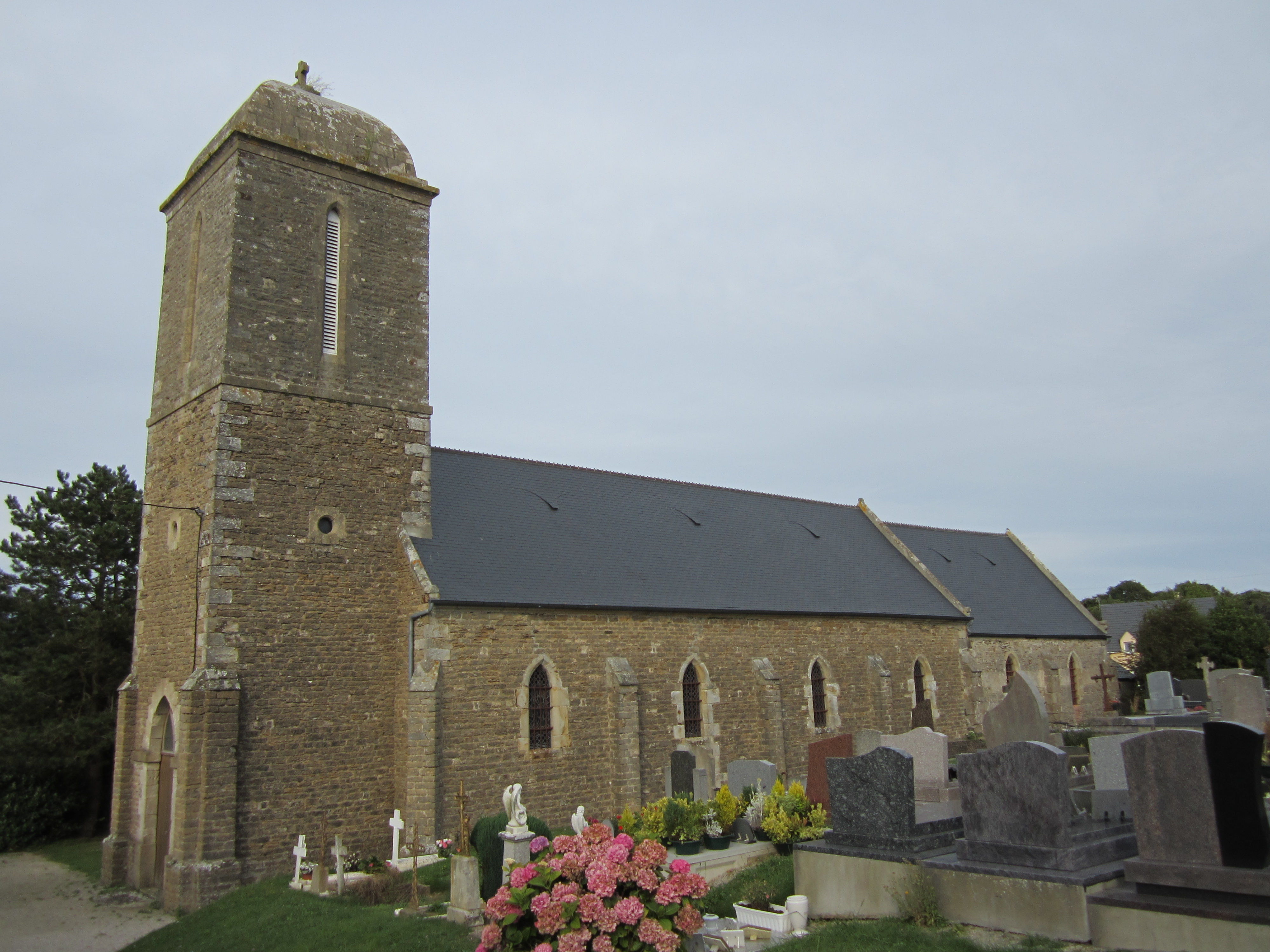 Église Saint-Martin de Baubigny_(Manche)